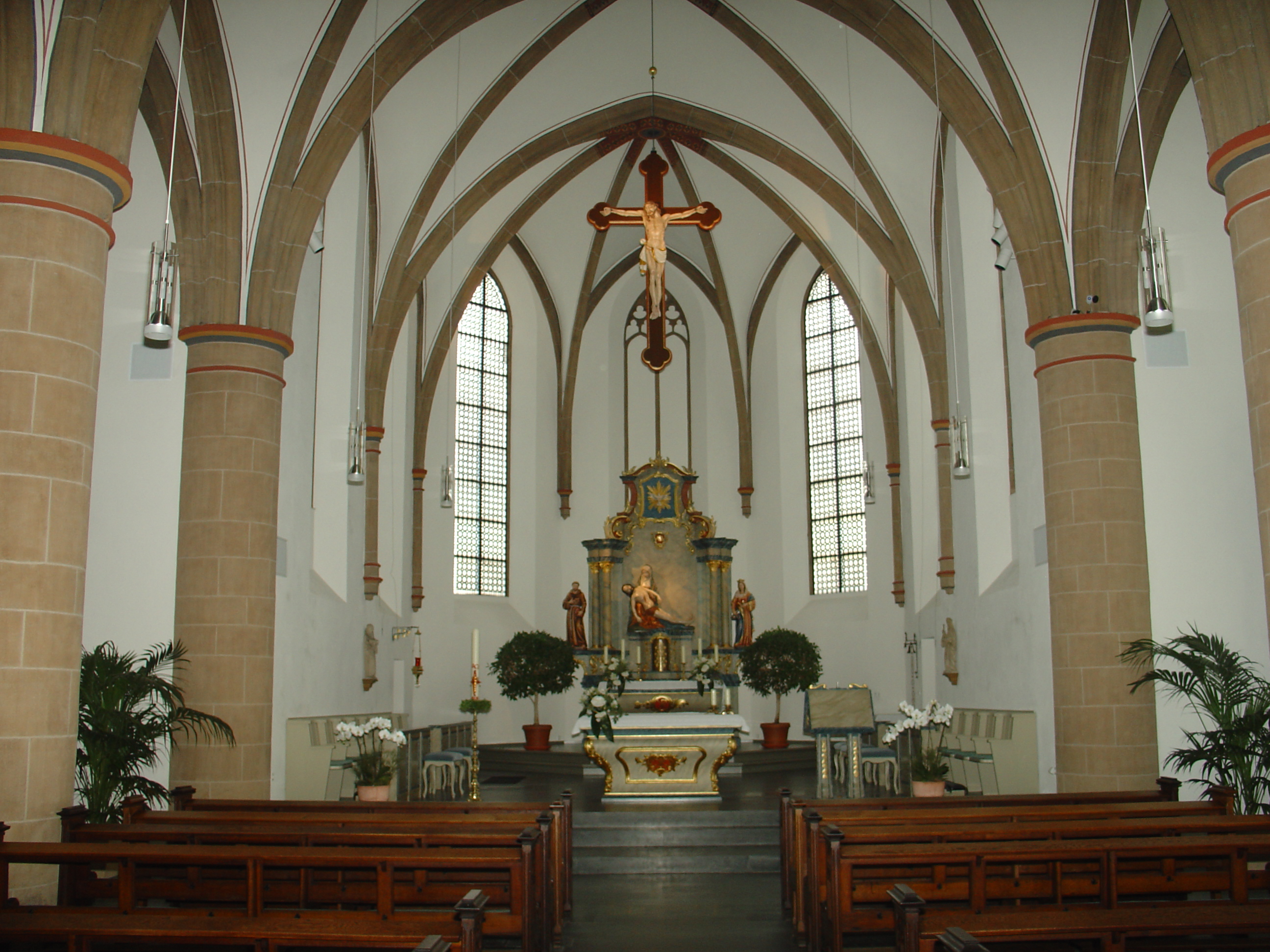 Innenansicht der St. Marienkirche des Franziskanerklosters in Rheda-Wiedenbrück